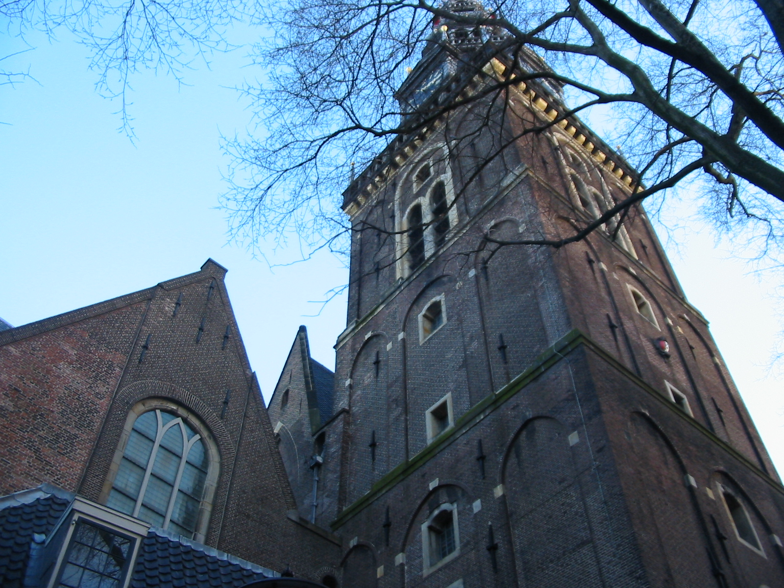 Amsterdam, Oude KerkOude Kerk